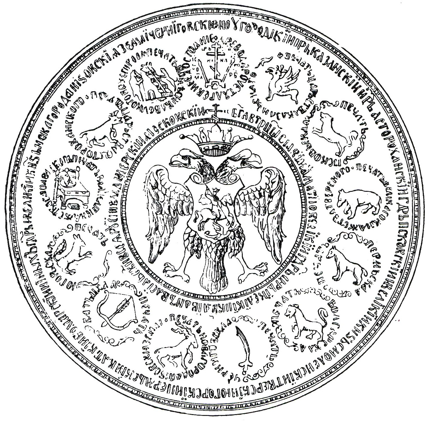 Ivan IV of Russia. Большая государственная печать Ивана Грозного последней трети 16 века (предположительно 1577 года) с гербами земель России, расположенными по кругу. Гербовник Винклера.